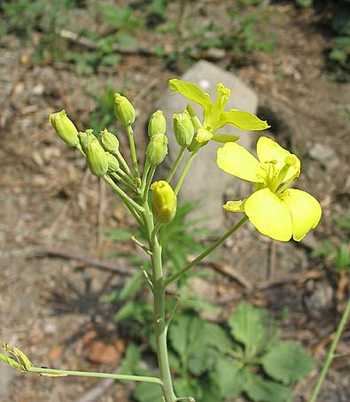 Diplotaxis tenuifolia (diplotaxis à feuilles étroites, roquette jaune) Photo prise à Rabouillet (66) en juillet 2004 Jean Tosti 2005